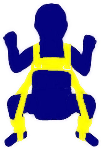 De Pavlik-bandage wordt gebruikt bij de behandeling van Heupdysplasie